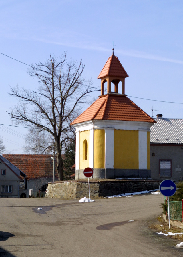 Česky: Kaple v Dolanech, okres Plzeň-sever.